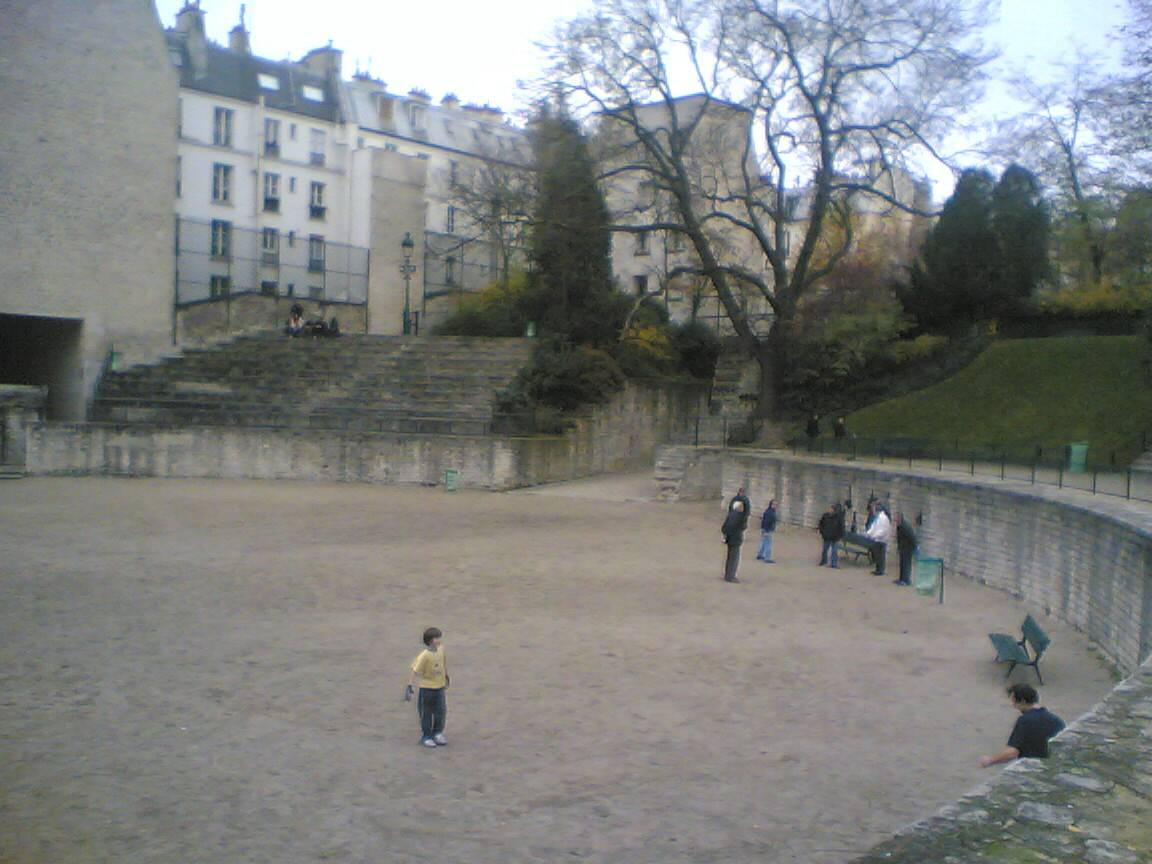 Roman arena in Paris